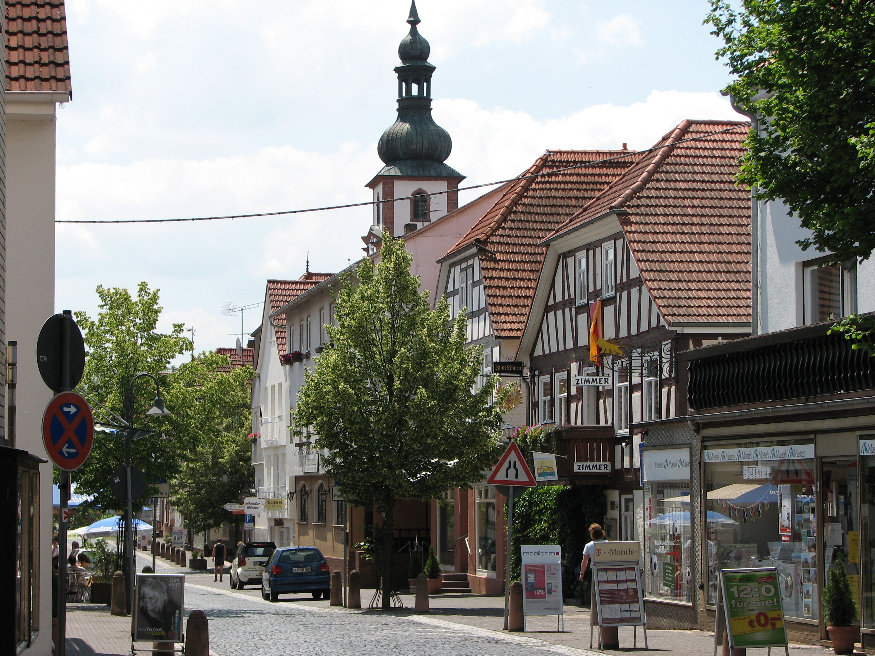 Altstadt Salmuenster